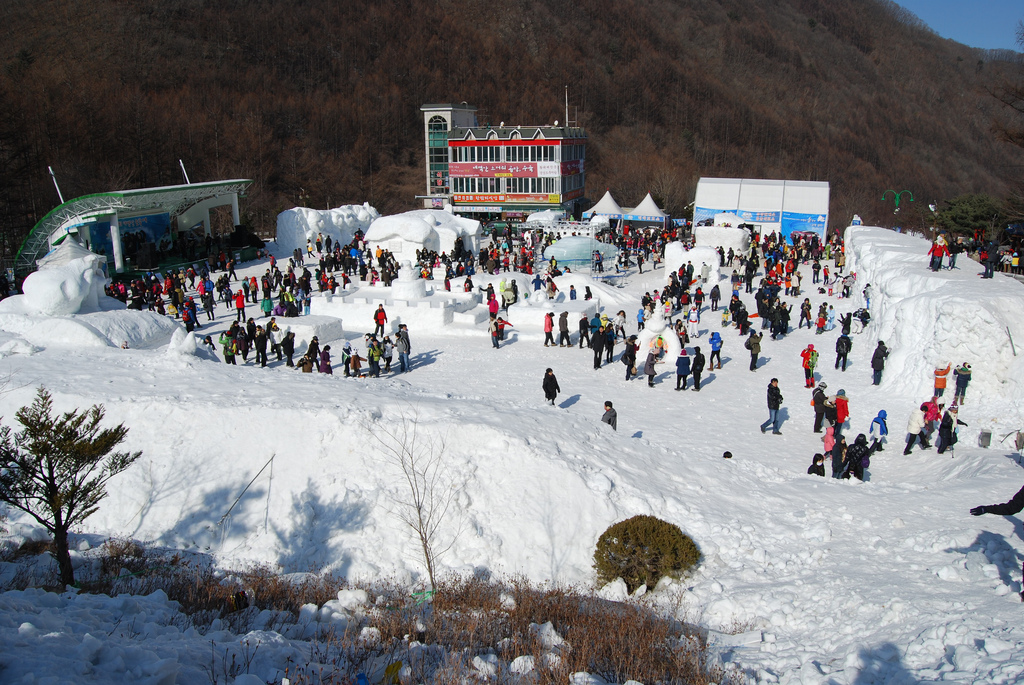 Taebaek Winter Festival